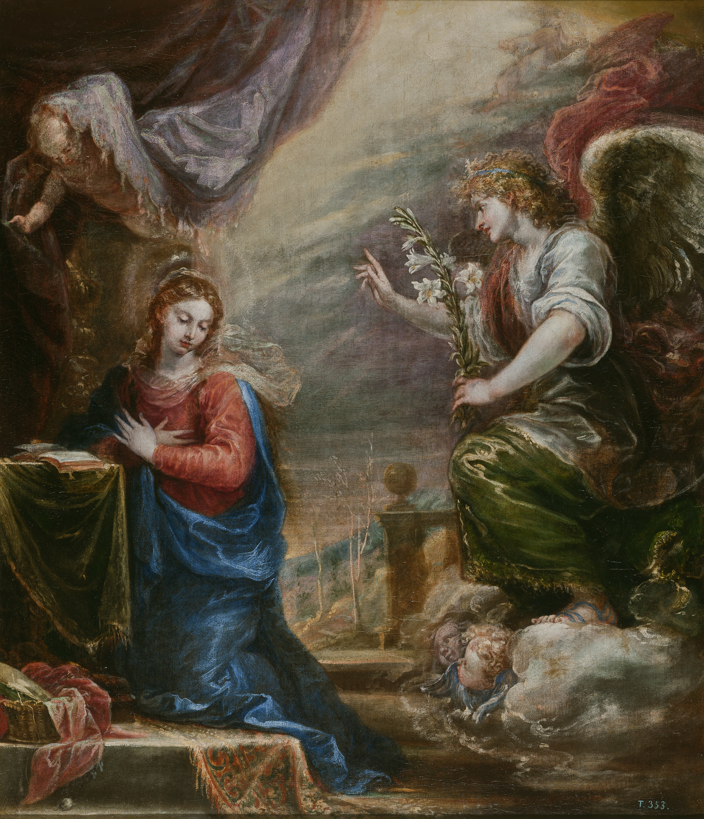 La obra representa el momento en que el arcángel San Gabriel anunció a la Virgen María que sería la madre de Jesucristo, el Mesías.